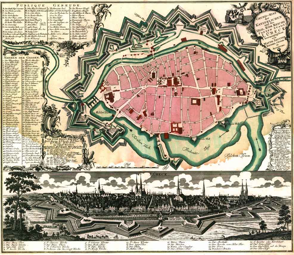 Stadtplan, Festungsanlagen und Panorama von Lübeck im späten 17. Jahrhundert.